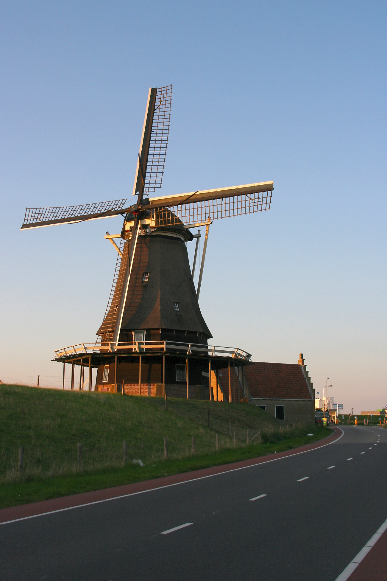 Medemblik: molen De Herder